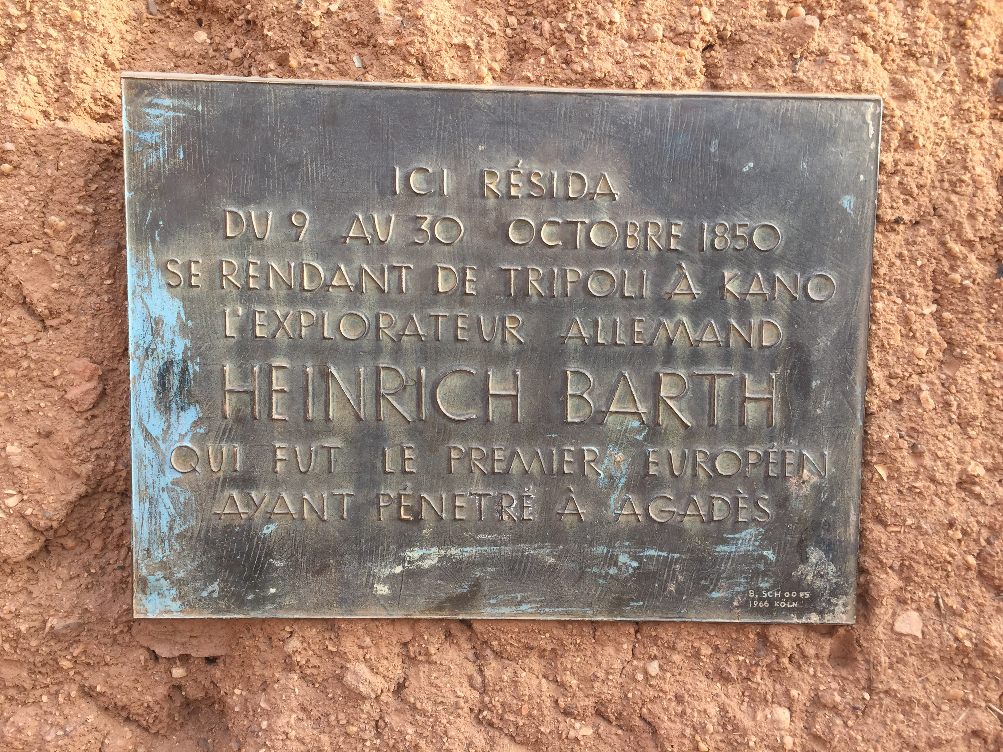 Gedenkplakette für den deutschen Afrikaforscher Heinrich Barth von 1966.